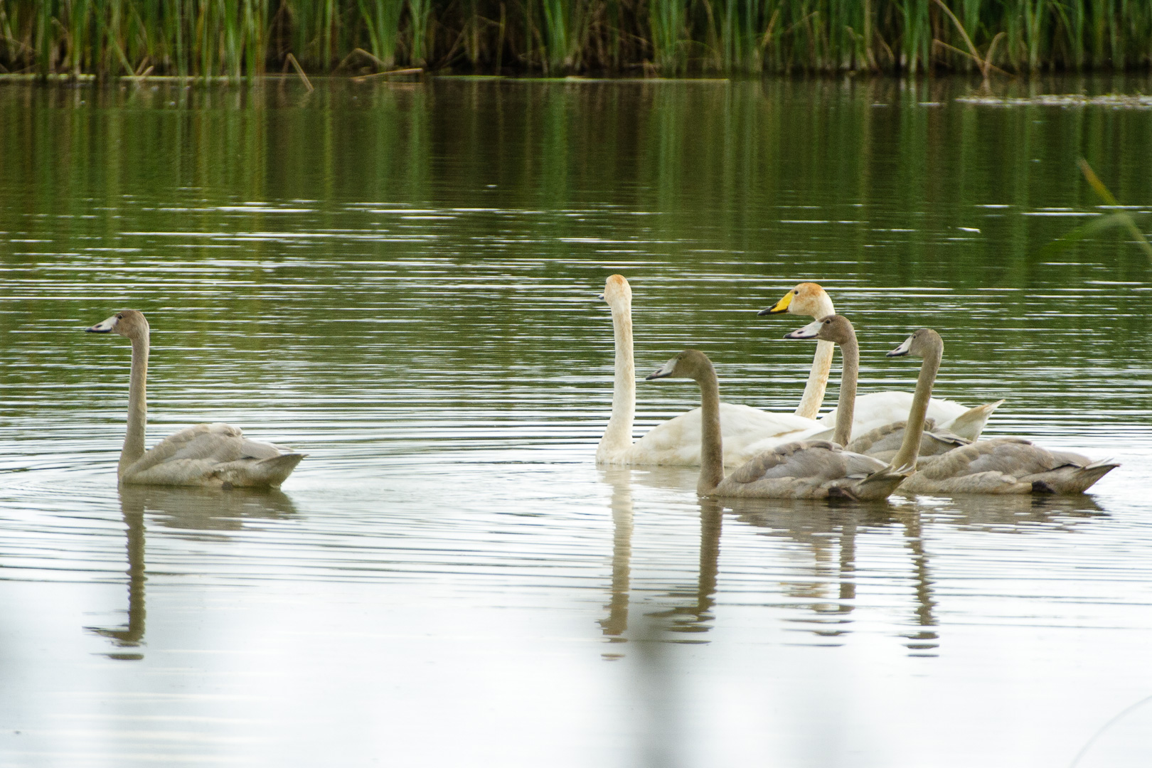 Lęgowe łabędzie krzykliwe Cygnus cygnus na stawach Stawinoga (rezerwat Stawinoga).